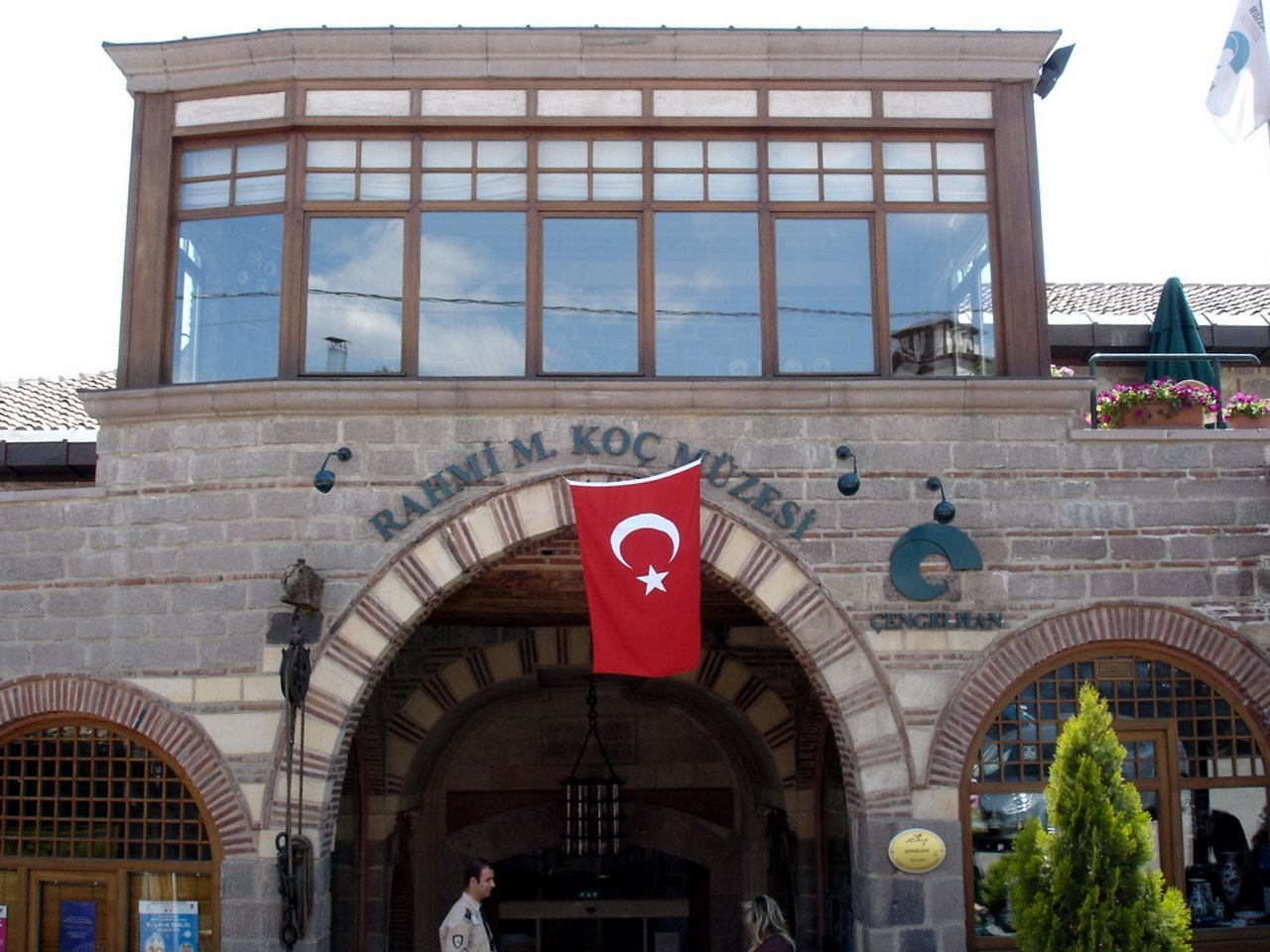 Çengelhan Rahmi M. Koç Museum, Ankara, Turkey.